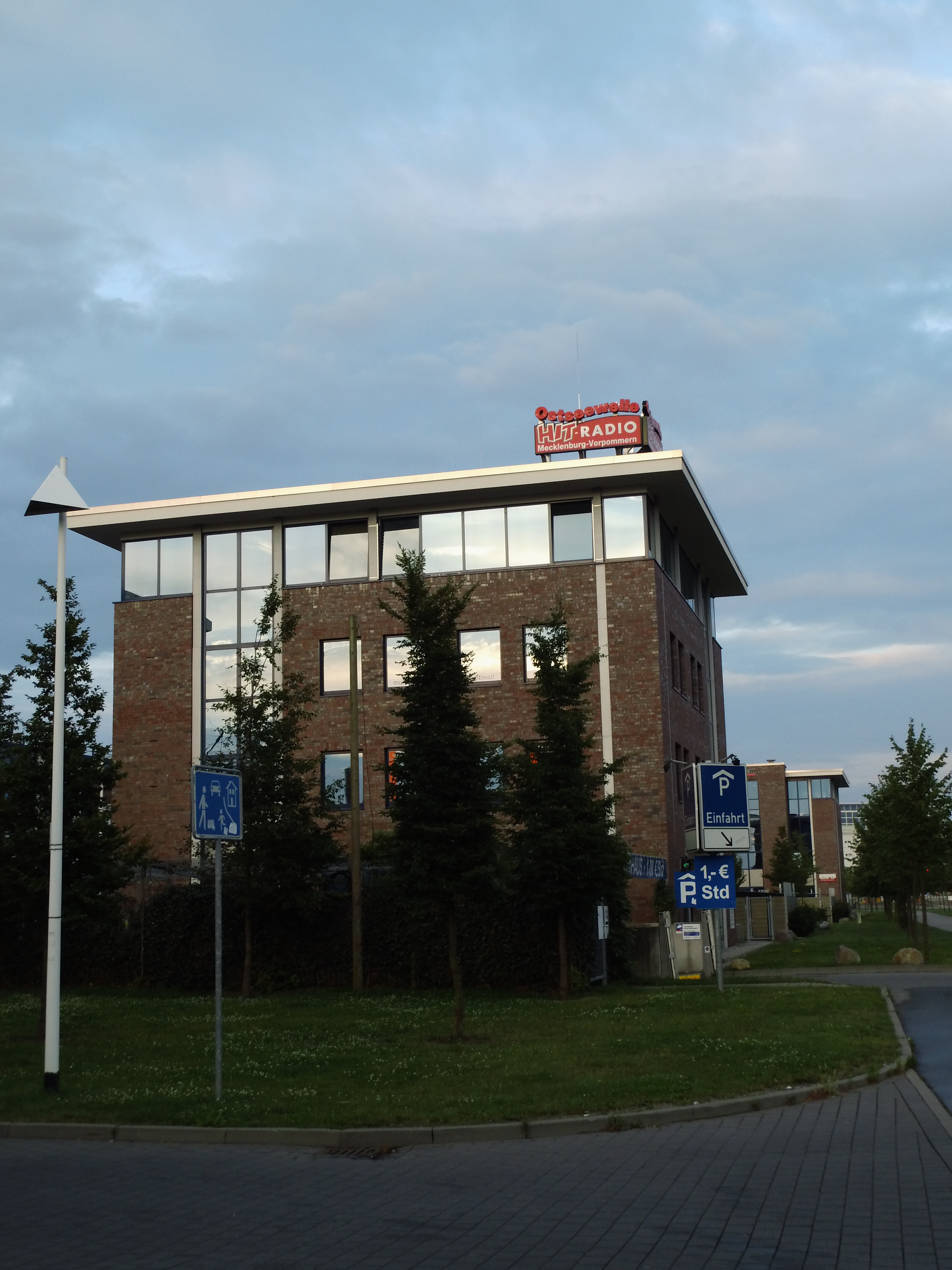 Studio von Ostseewelle Hitradio im Rostocker Stadthafen